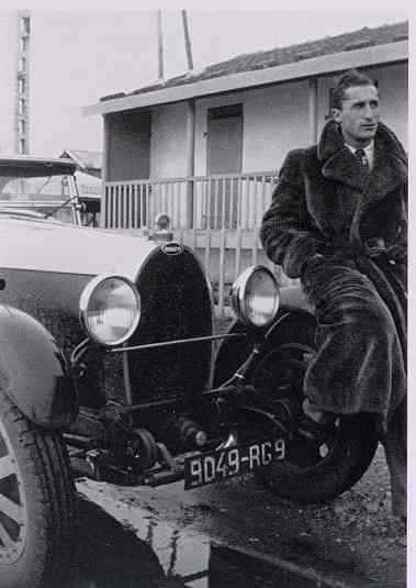 Rob Roy et sa Bugatti